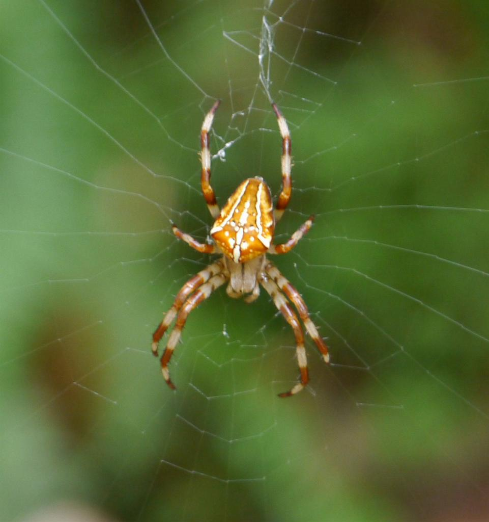 Araneus ishisawai：イシサワオニグモ 2015/08/14 和歌山県田辺市：Tanabe City. Wakayama Pref. Japan